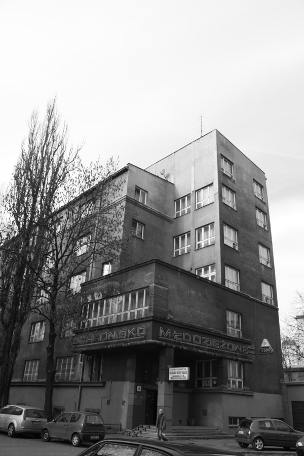 Miejski Dom Wycieczkowy(1932), ul. Oleandry, Kraków